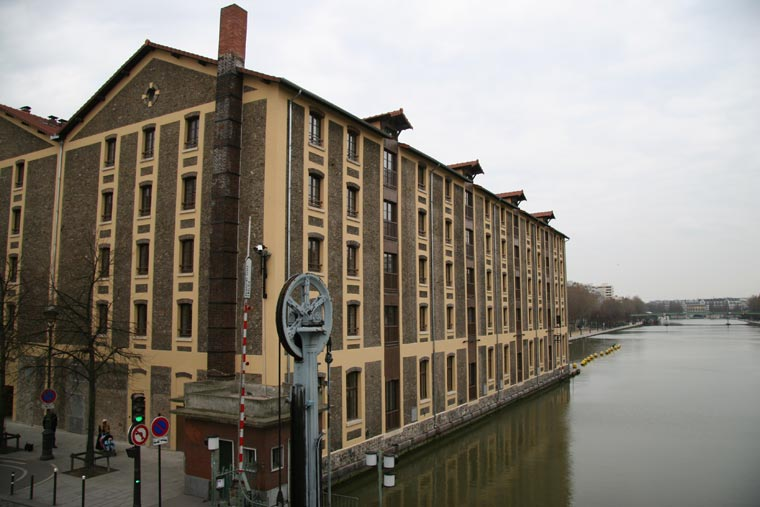 Résidence Quai de la Loire, Cité internationale universitaire de Paris